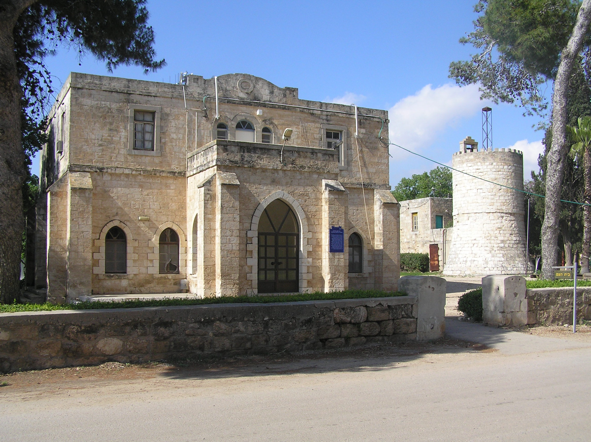 ראשוני המתיישבים באתר היישוב אלוני אבא היו בני הדור השני של תנועת הטמפלרים הגרמנים, אשר הקימו במקום בשנת 1907 מושבה חקלאית קטנה ושמה "ולדהיים".להיכנס